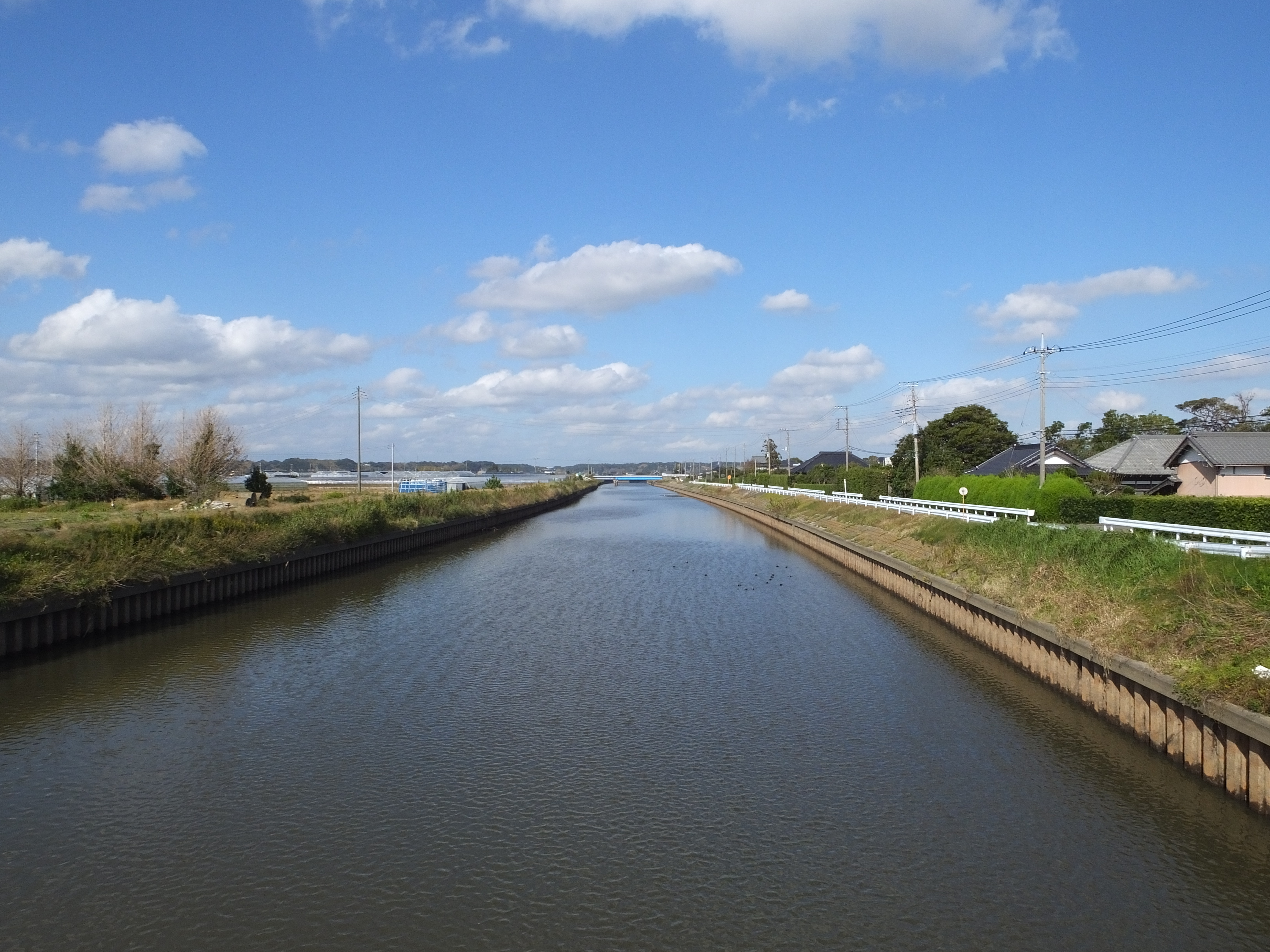 新川（齢橋より上流方、千葉県旭市）